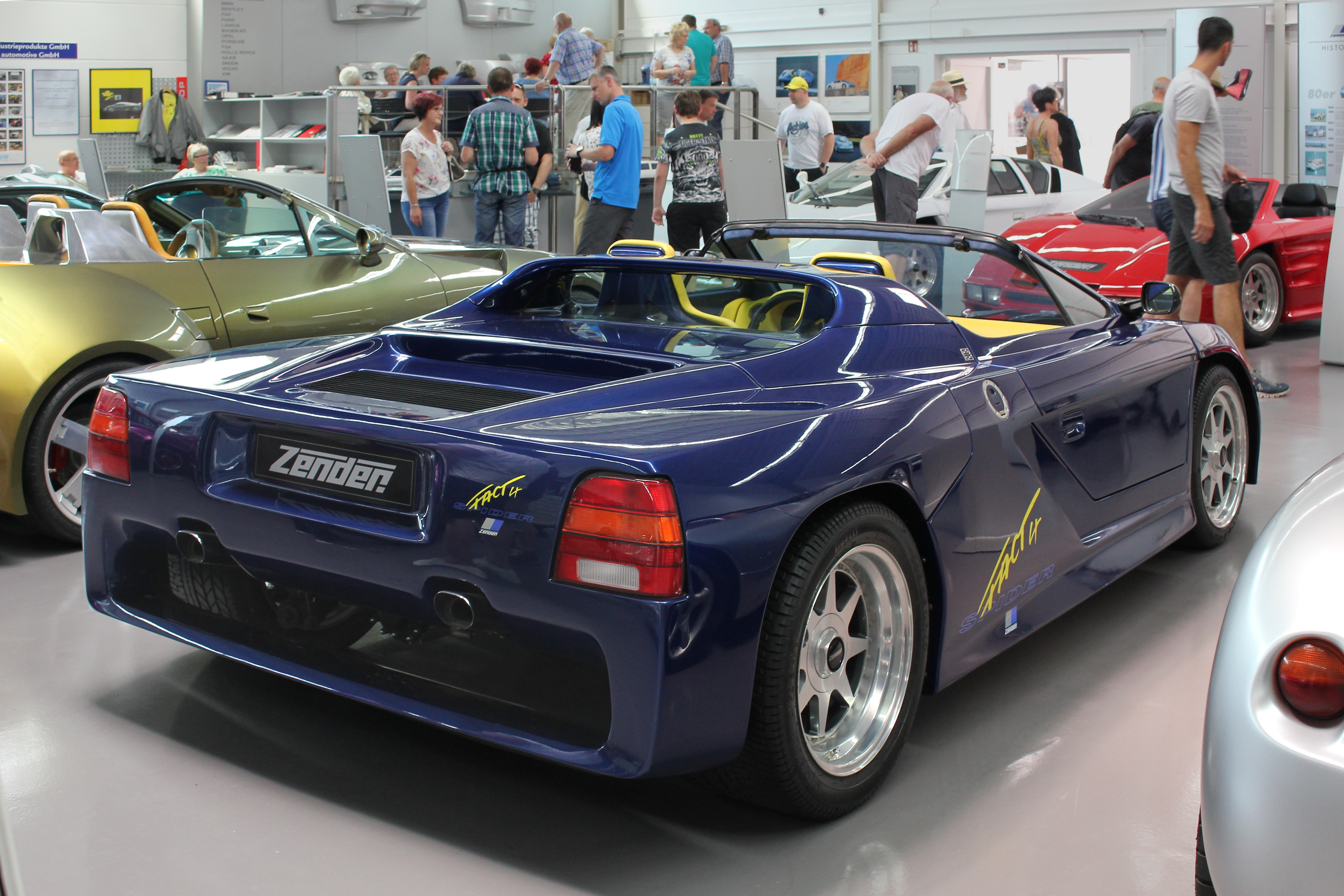 Zender Fact 4 Spider, Baujahr 1991; Audi-V8-Motor in Fahrzeugmitte, 250 PS, Gitterrohrrahmen aus Edelstahl, Karosserie aus Faserverbund-Kunststoff. Konstruiert von Zender-Mitarbeitern in Mülheim-Kärlich. Der Wagen wurde auf der IAA 1991 in Frankfurt erstmals vorgestellt. Er blieb ein Einzelstück.